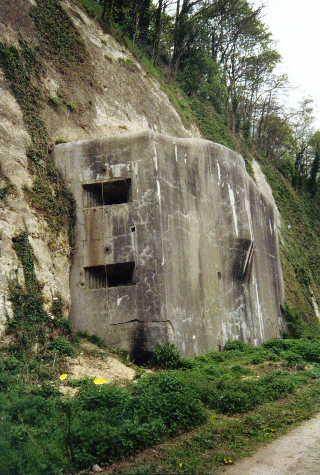 Eben Emael-Bunker Kanal Nord von Süden fotografiert.